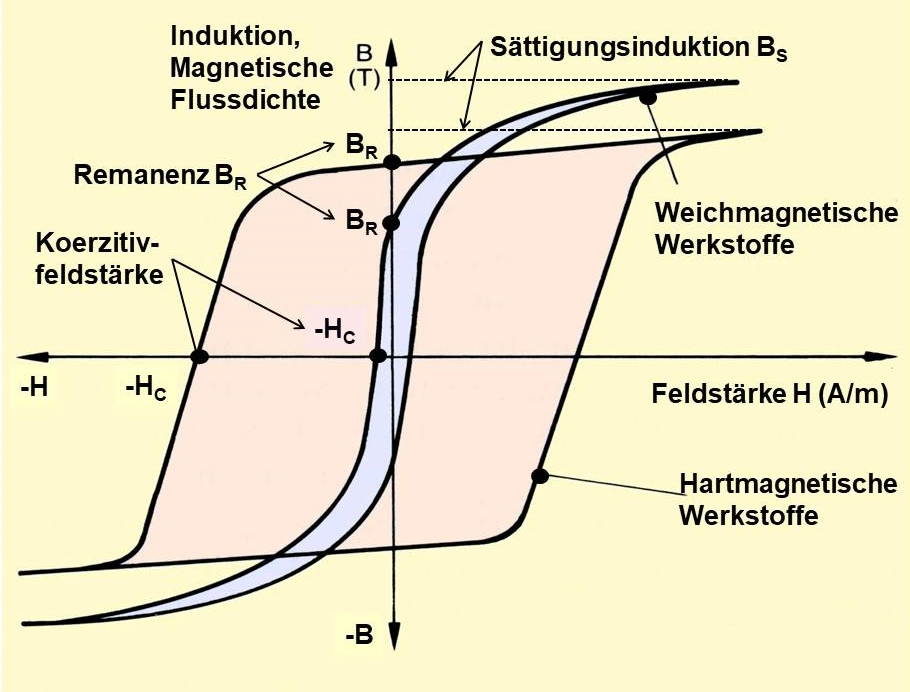 Hysterese, Unterschied zwischen hart- und weichmagnetischen Werkstoffen